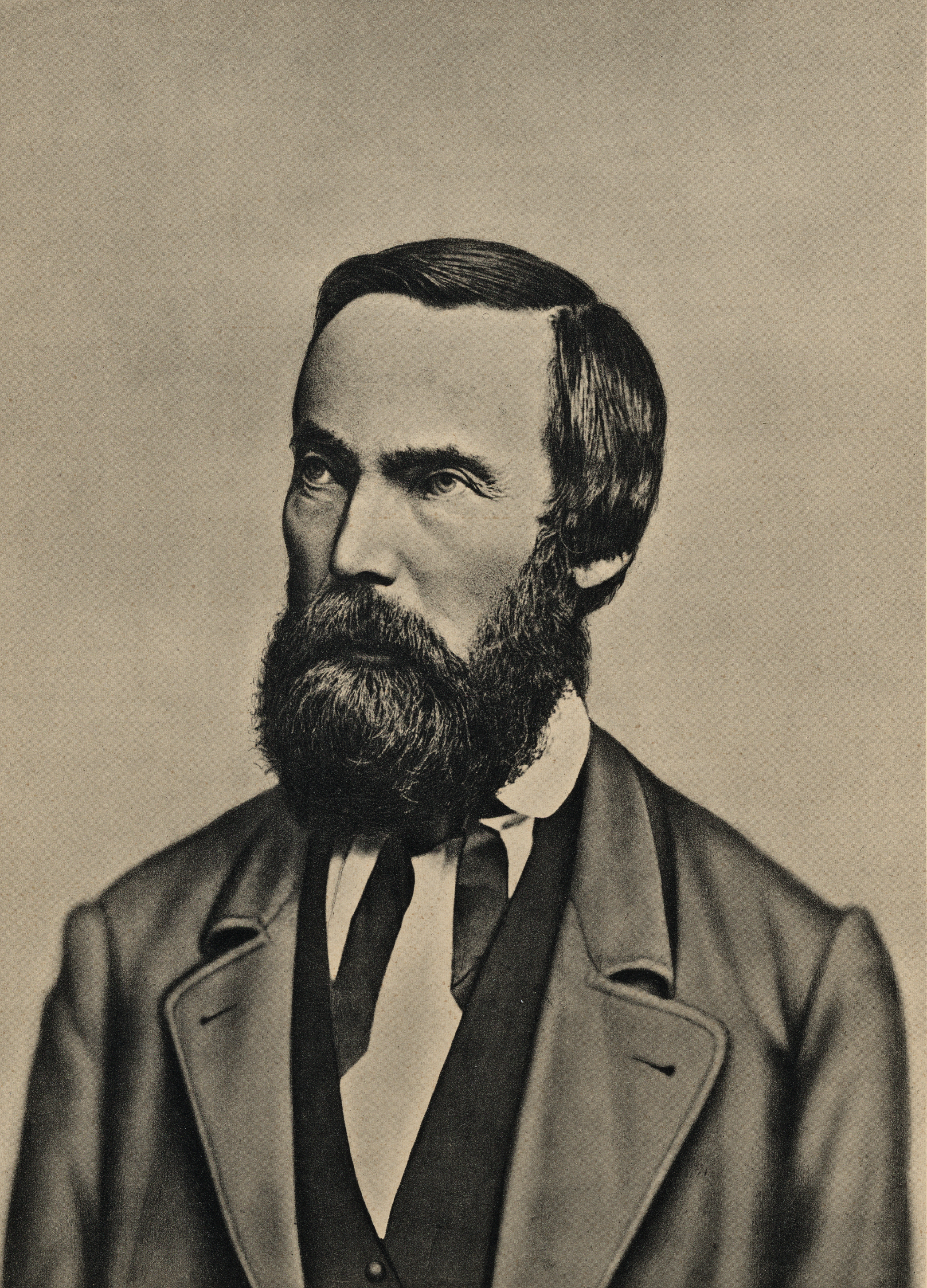 Format: Litografi (etter fotografi fra ca. 1867) Utgivelsesår / Published: 1914 (Vore Høvdinger 43) Utgiver / Publisher: F. Bruns Bokhandels Forlag, Trondhjem Eier / Owner Institution: Trondheim byarkiv, The Municipal Archives of Trondheim Arkivreferanse / Archive reference: Ila skole, Va - F9416